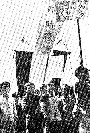 食料メーデーに参加する学童たち。皇居前広場にて。